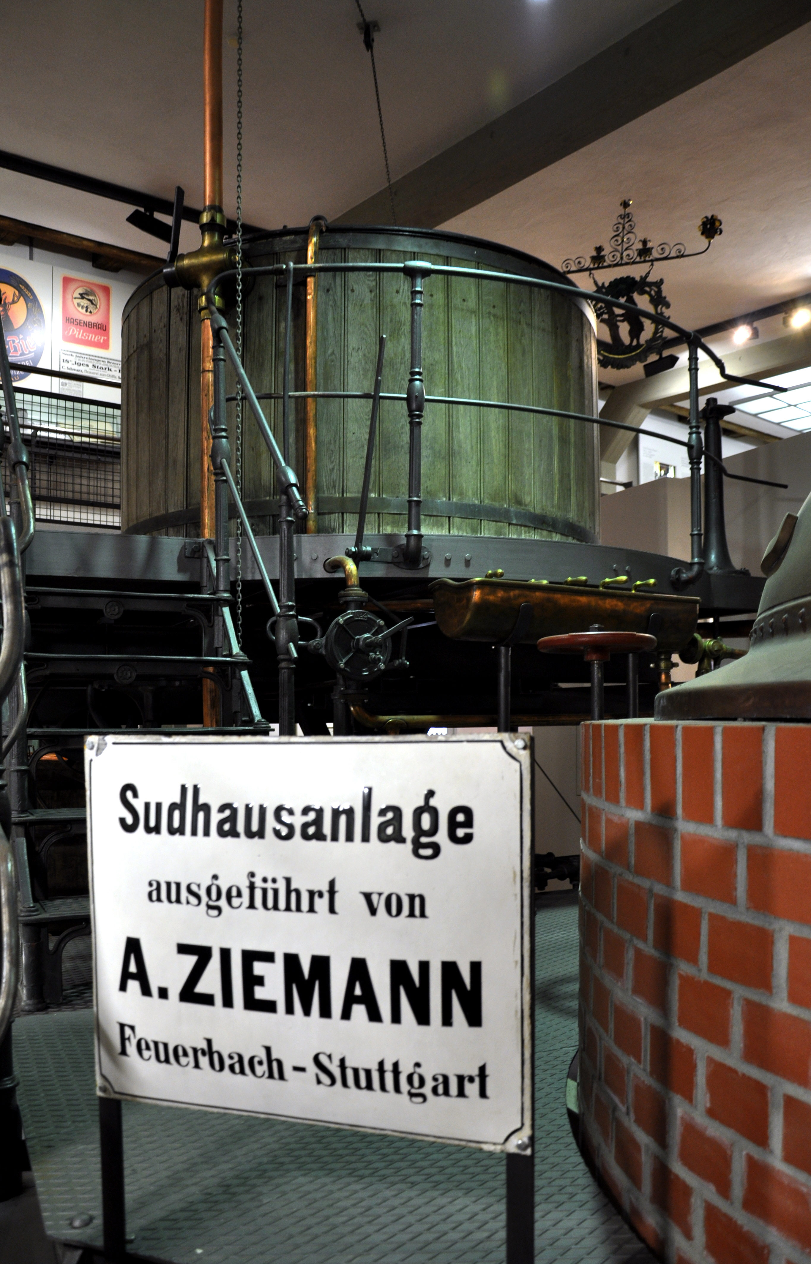 Stadtmuseum Bad Saulgau, Zweigeräte-Sudhausanlage der Adler-Brauerei in Saulgau-Moosheim